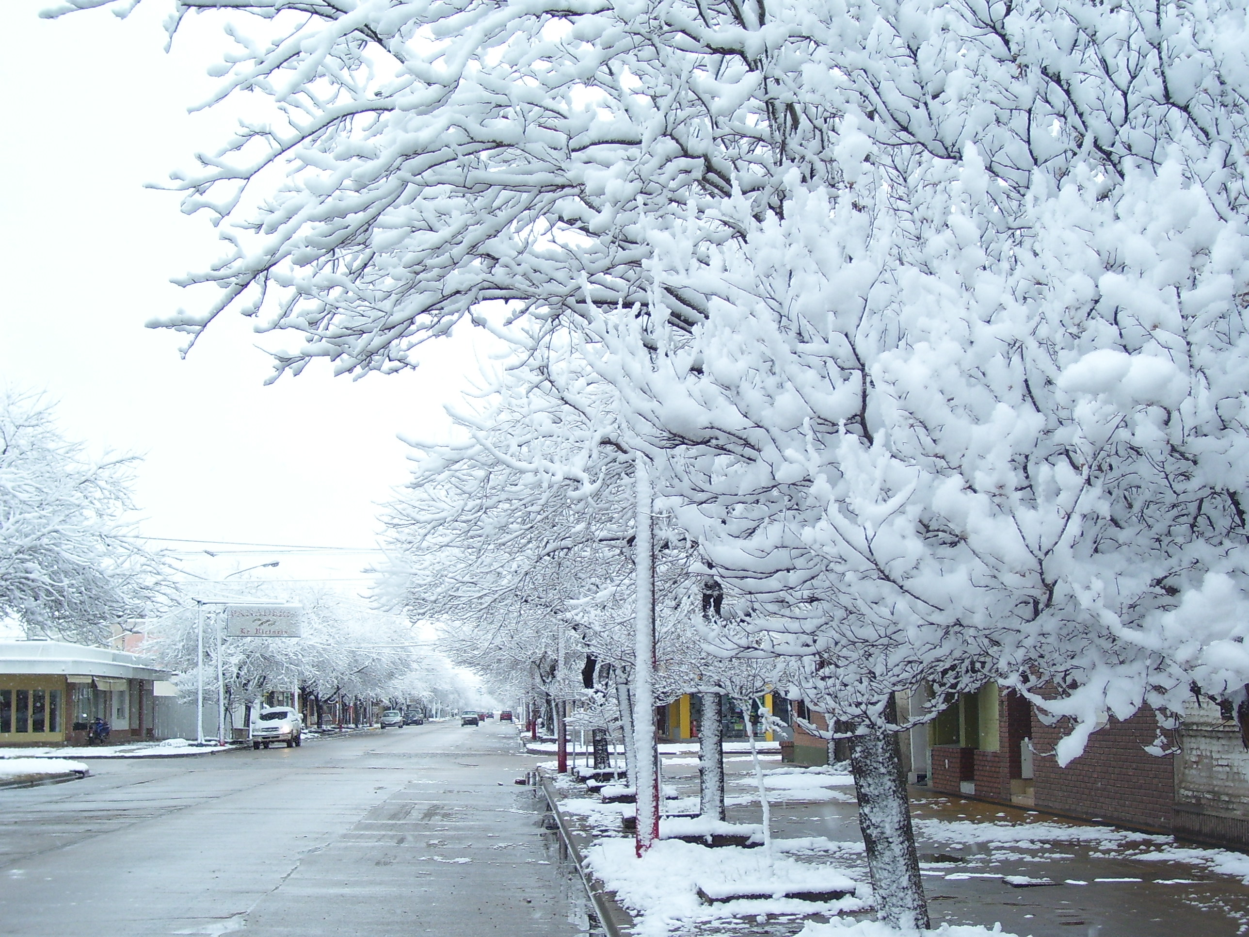 Nieve en La Carlota, ArgentinaLietuvių: Sniegas La Karlotoje, Argentina